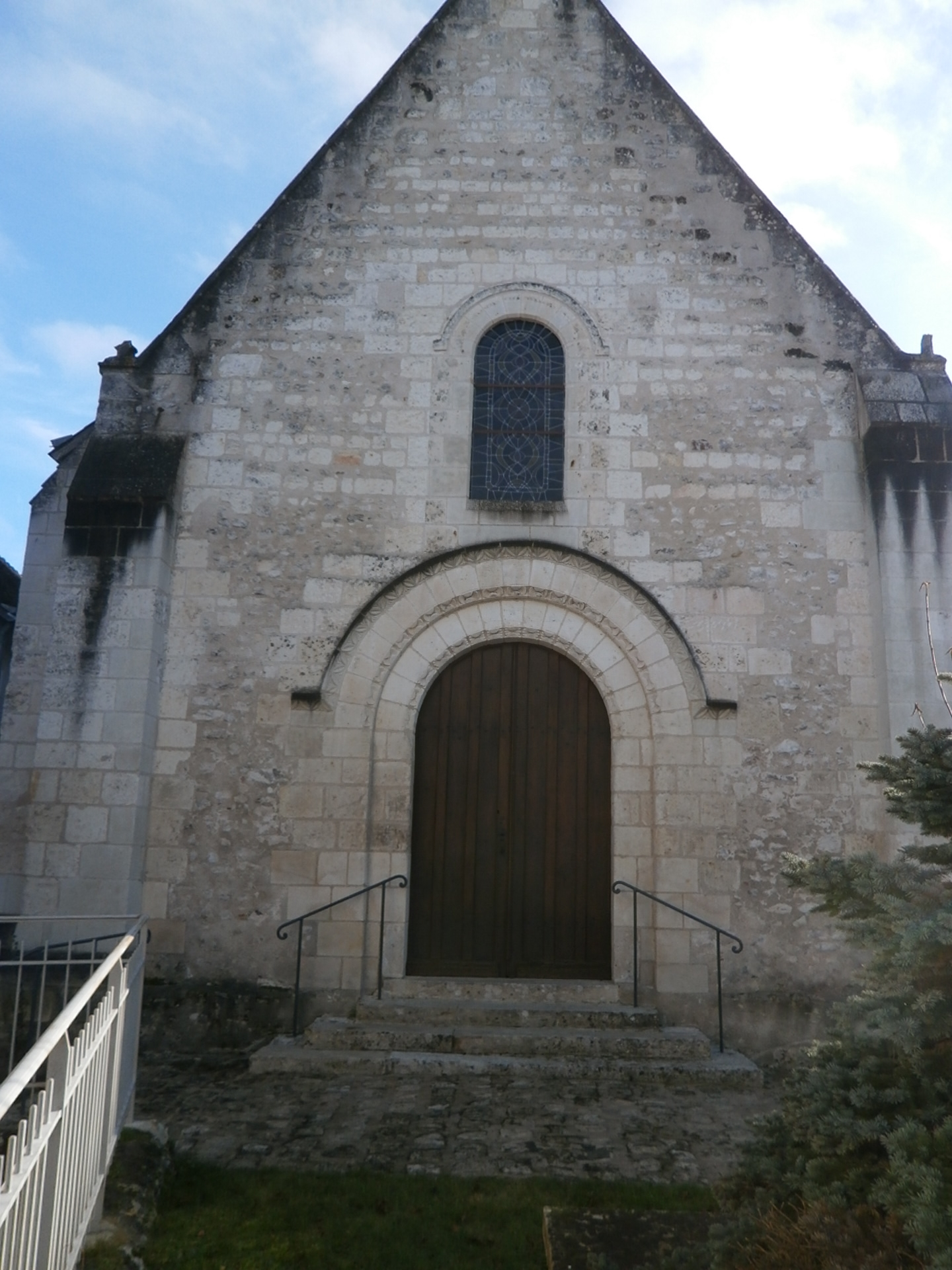 Le portail septentrional de l'église